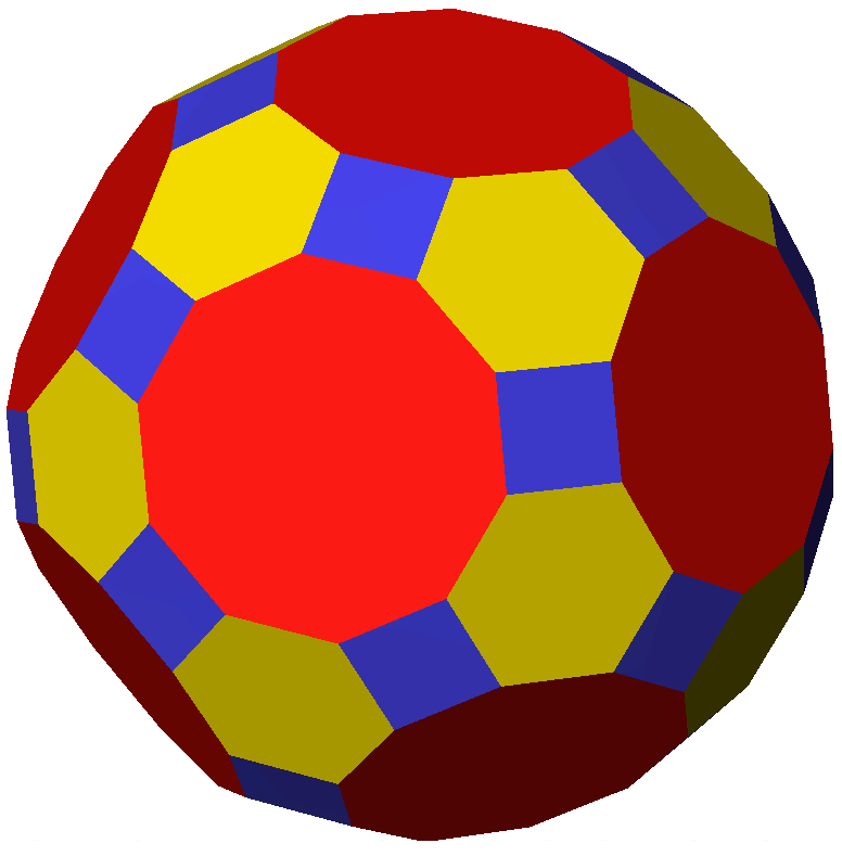 Great rhombicosidodecahedron